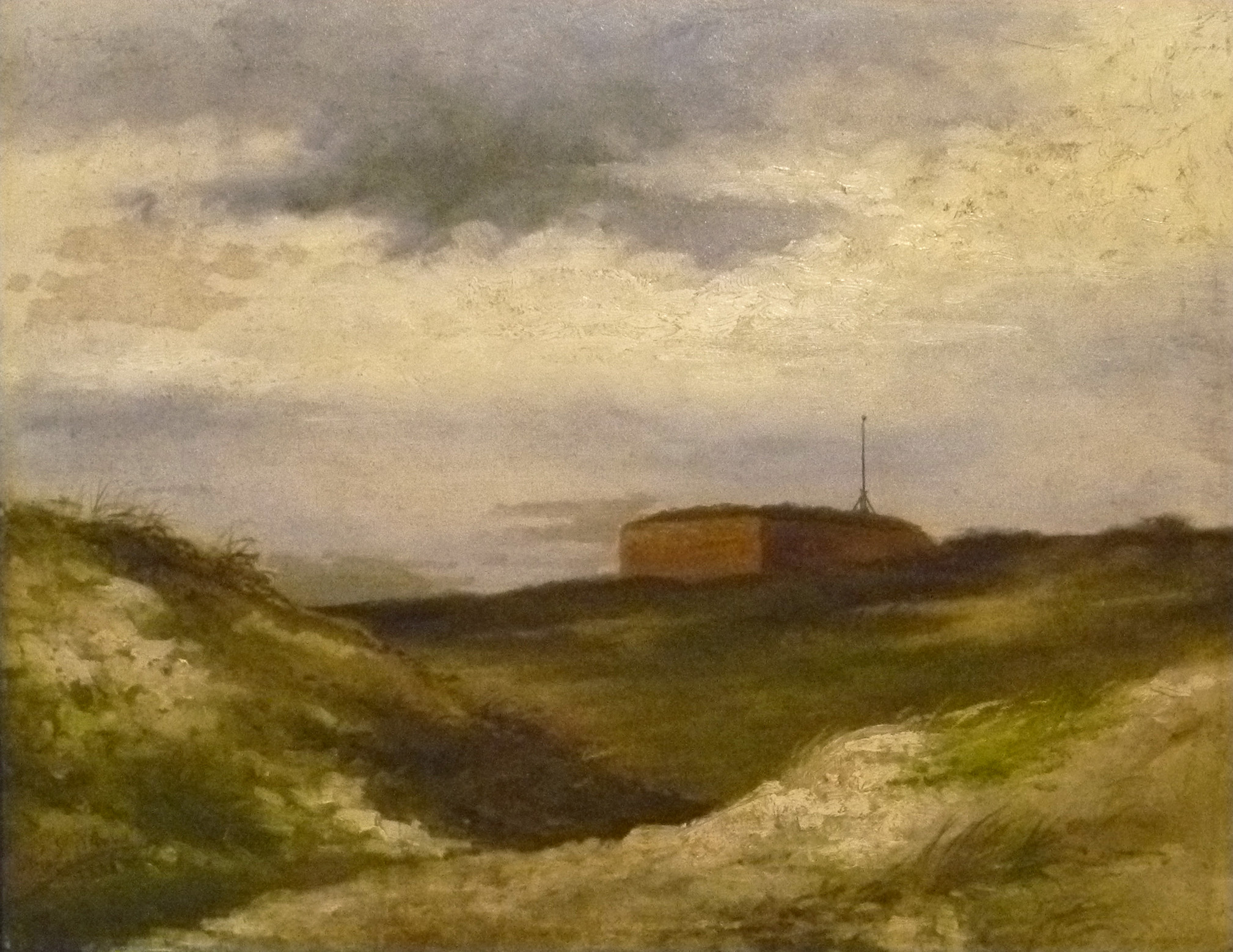 "Fort Napoleon" (1885), olieverf op paneel door de Belgische kunstschilder Emile Spilliaert (1858-1913); collectie Stad Oostende in MuZee